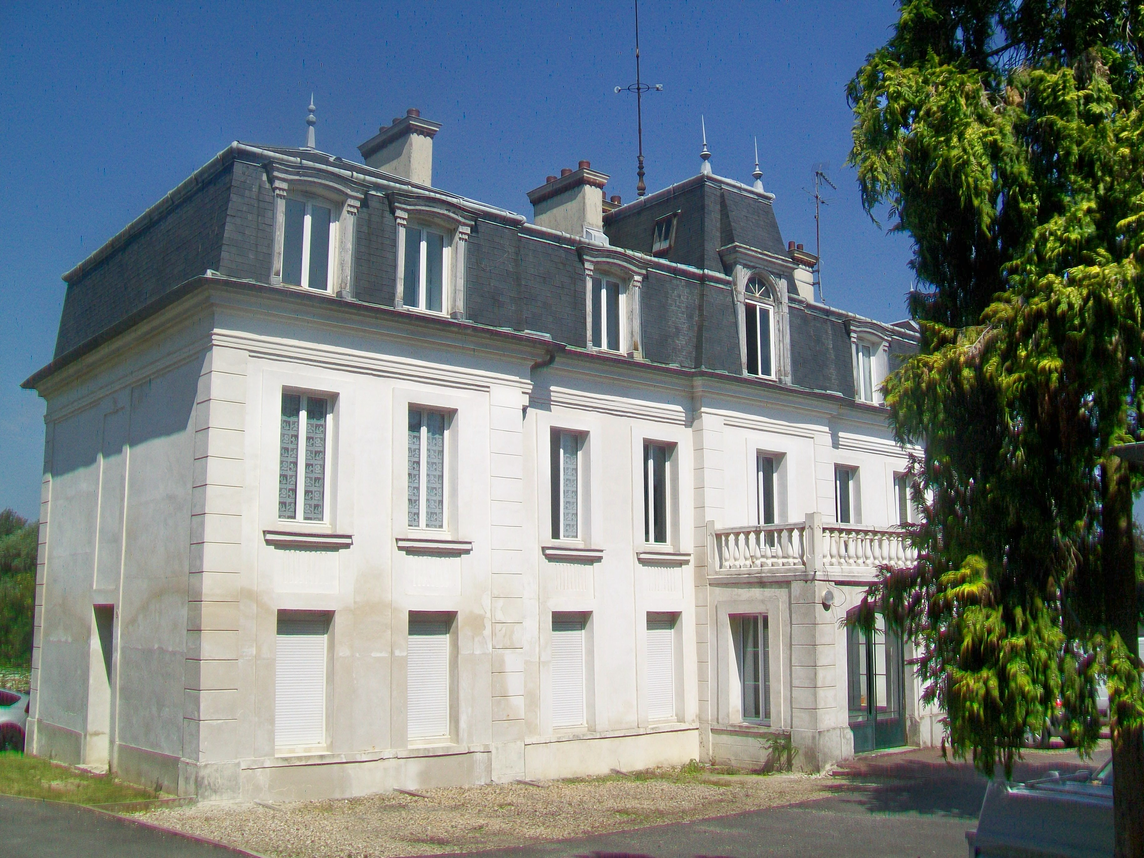 Le manoir de la Delphinière, rue de la Mairie. Madame de Staël y résida pendant trois mois, en 1803. Avant d'être divisé en appartements, la maison a abrité le Centre européen de recherches médicales et biologiques.